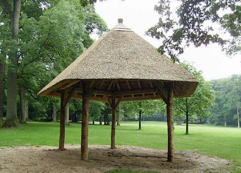 Een nutsgebouwtje in Ter Kamerenbos (Brussel).